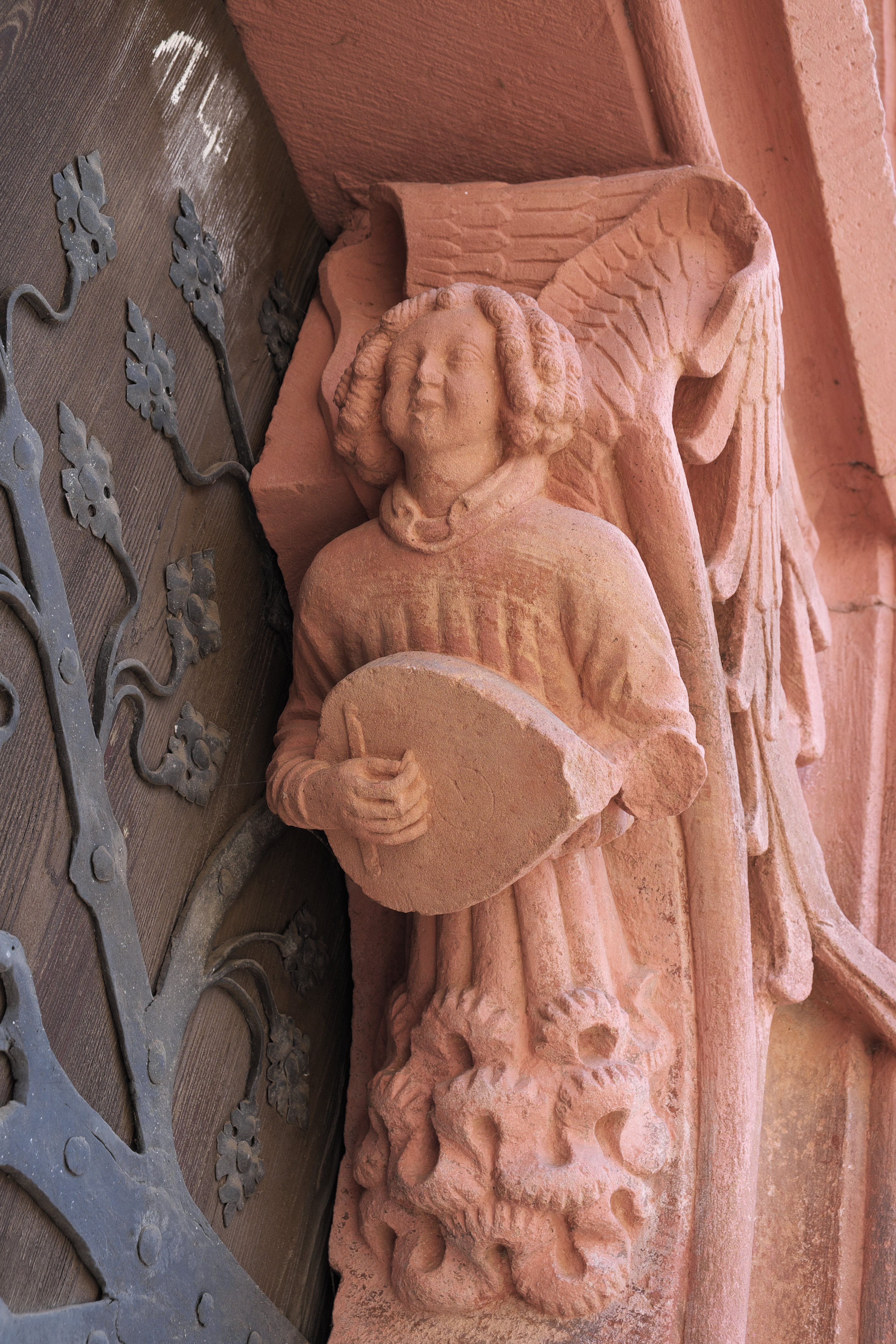 Katholische Martinskapelle in Bürgstadt im Landkreis Miltenberg (Unterfranken/Bayern), gotisches Westportal, um 1490, Konsole am Türstürz mit Engelsfigur